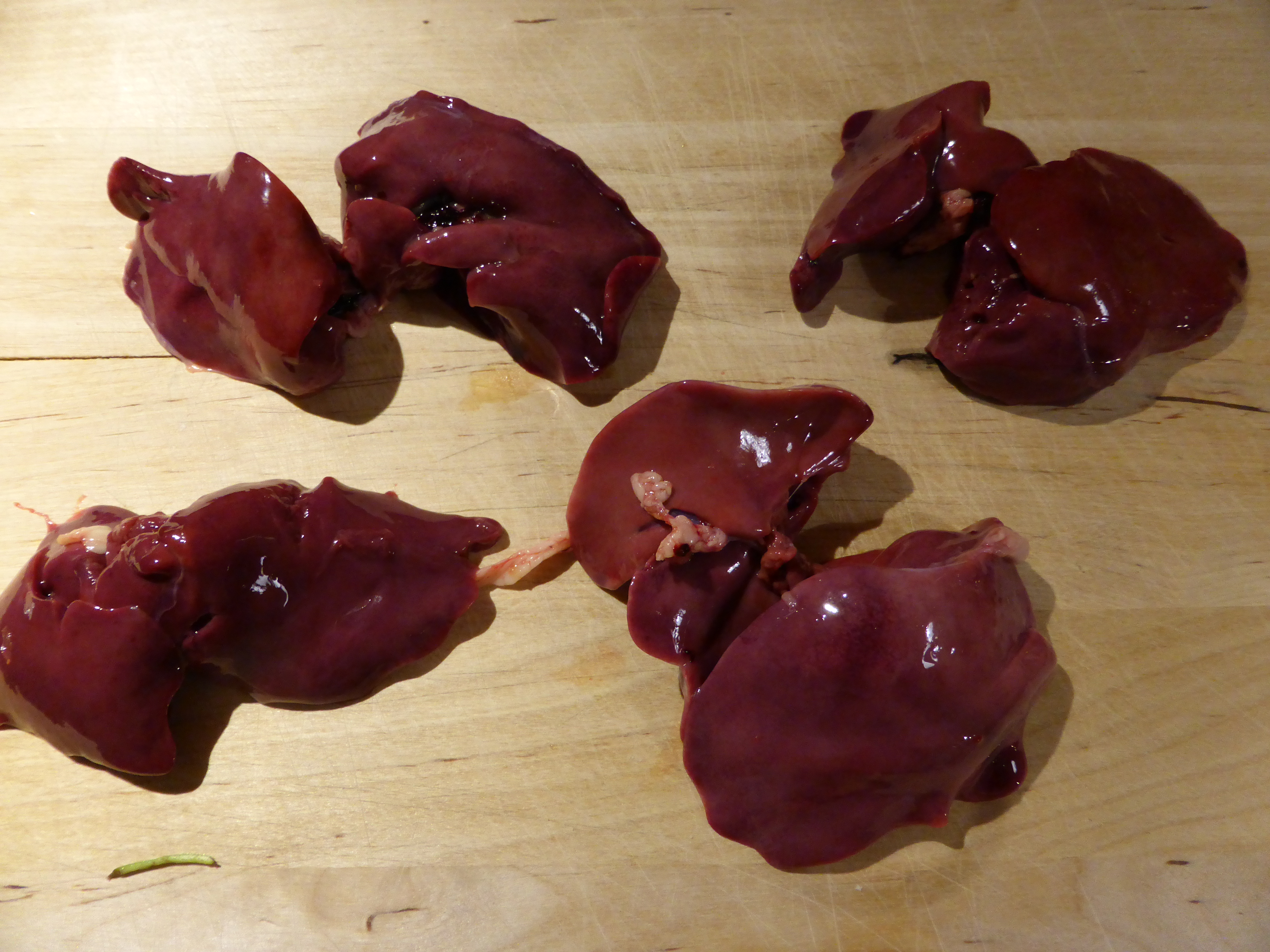 Preparing chicken liver, raw liver on cutting board